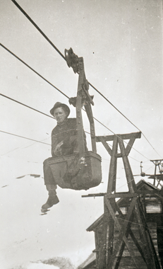 Karl Fjell i krybbe (kibbe) på taubanen mellom Sulis og Jakobsbakken. 1950 - 1955. NM.F.007995-00008